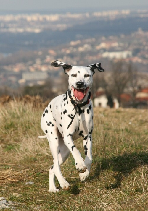 Un jeune dalmatien courant